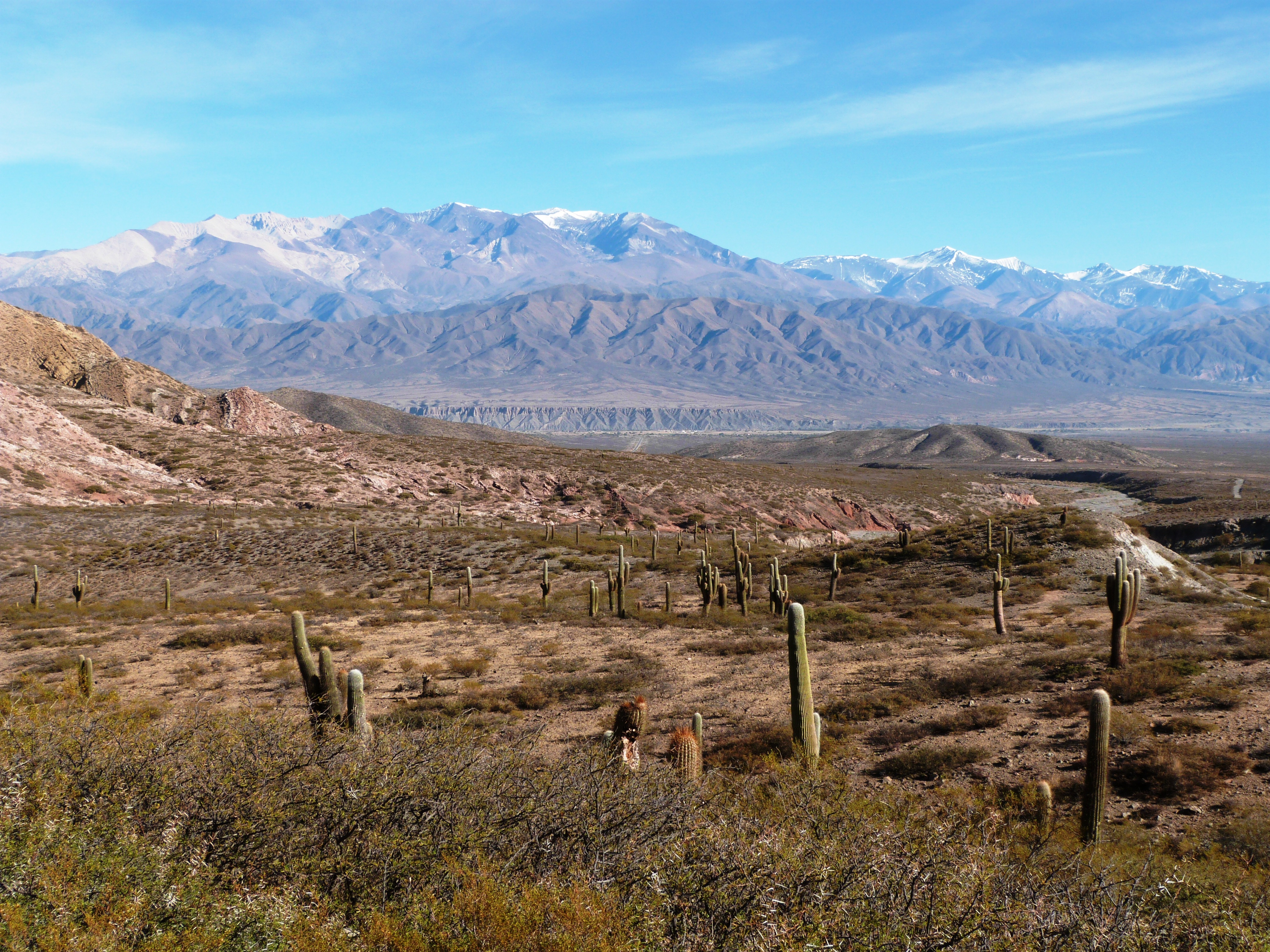 MIKEMDP